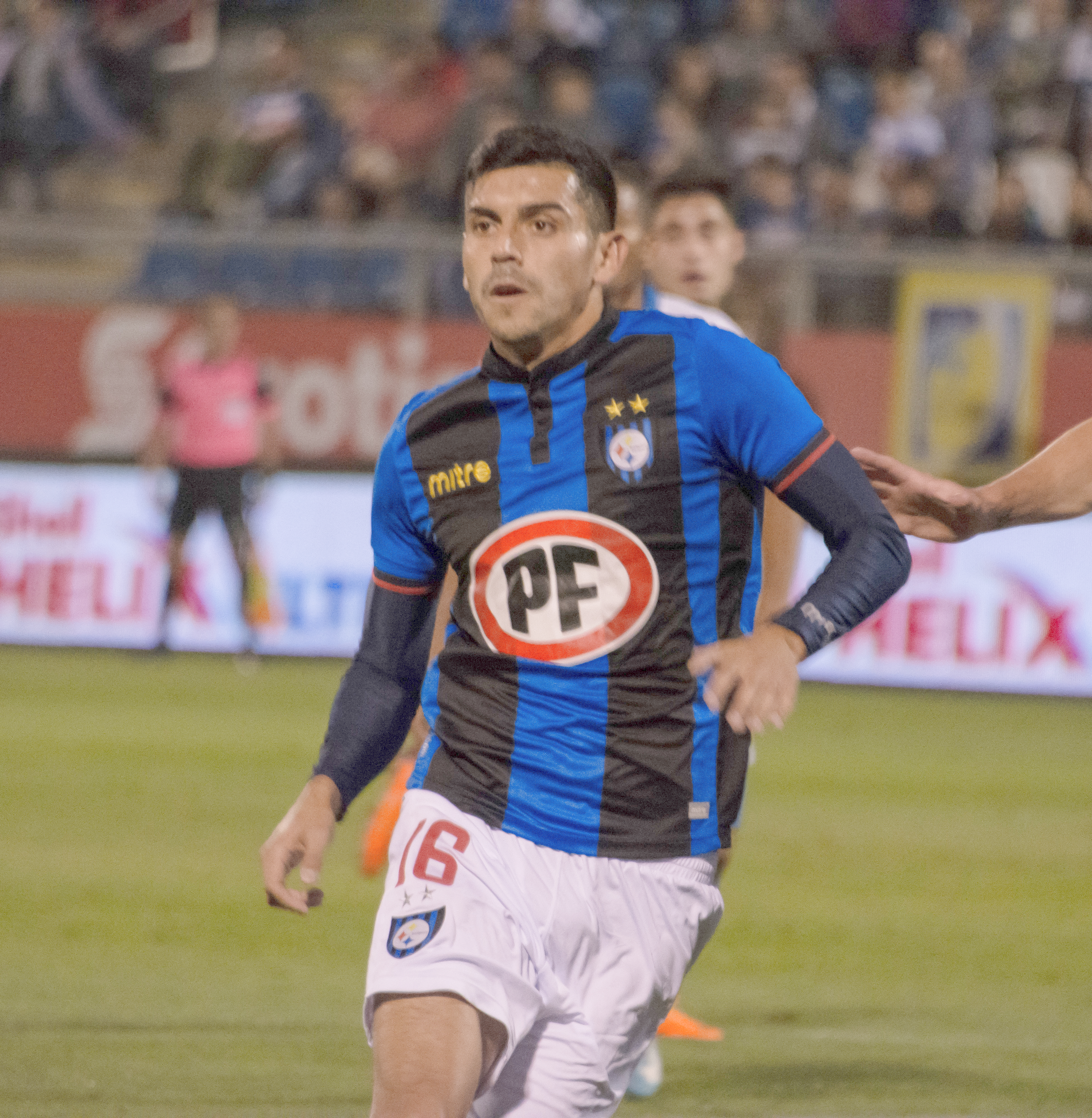 Universidad Católica v Huachipato, Estadio San Carlos de Apoquindo, Las Condes, Santiago, Chile.